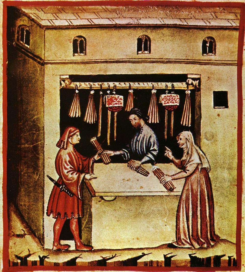 Tacuina sanitatis (XIV century) 3-aspetti di vita quotidiana, illuminazione,Taccuino Sanita